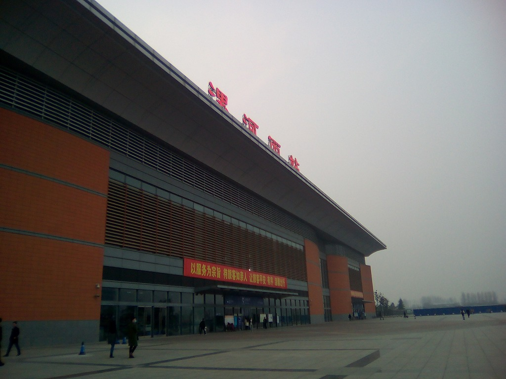 Luohexi railway station